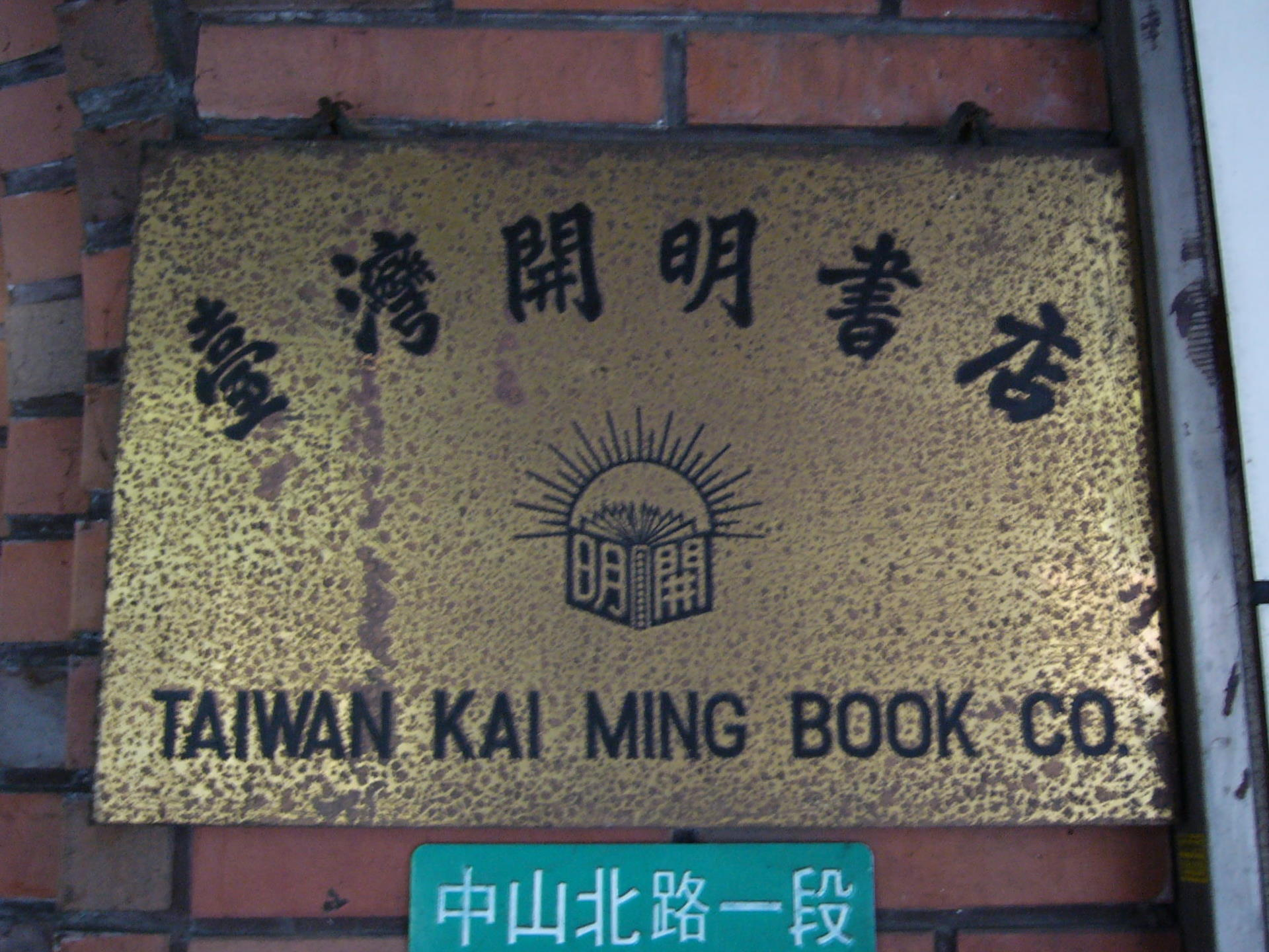 臺灣開明書店總部銘板，位於臺北市中山區中山北路一段77號1樓騎樓，2019年9月1日重訪時已不存。